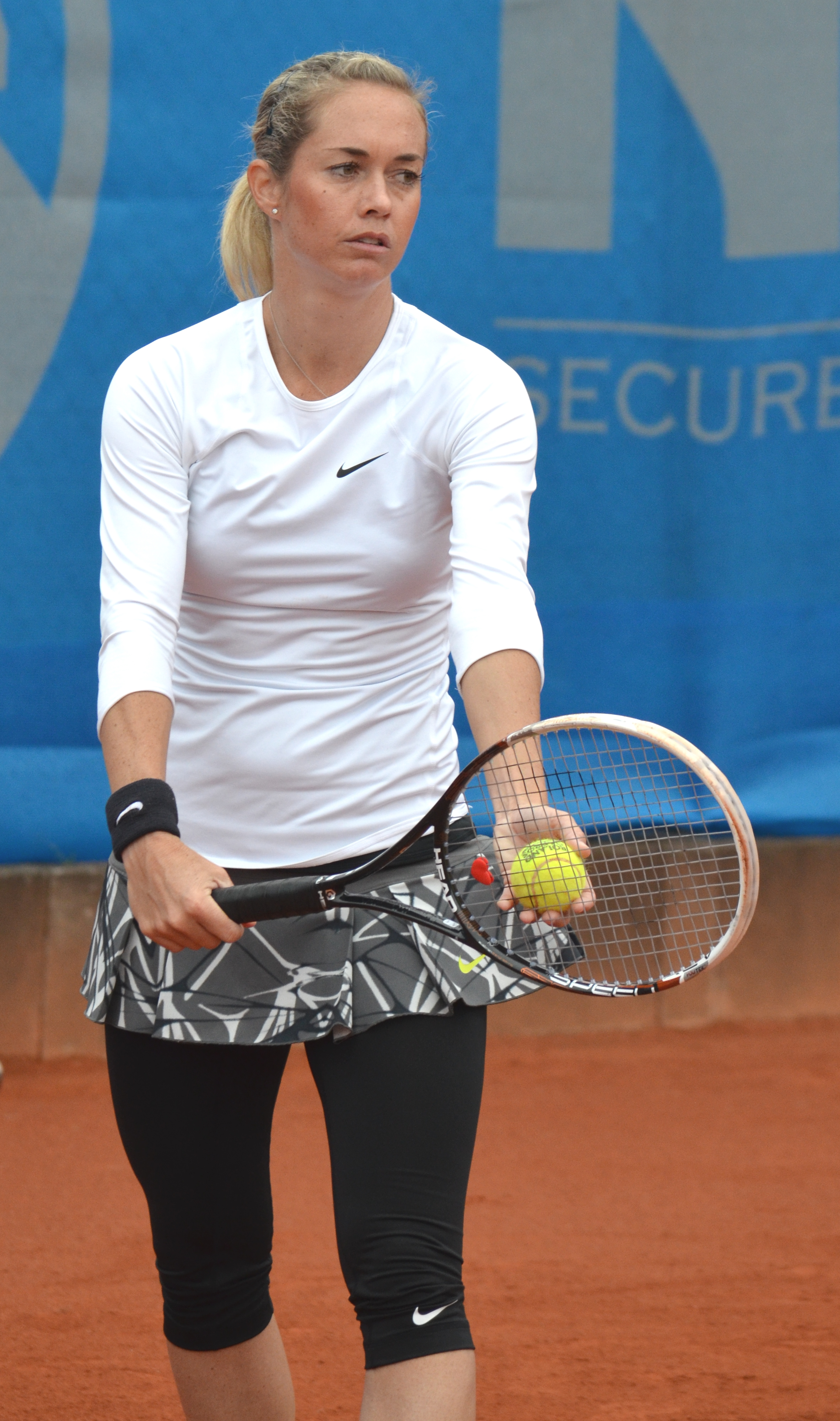 Klára Koukalová in der Erstrundenbegegnung der Einzelkonkurrenz beim Nürnberger Versicherungscup 2014 gegen Polona Hercog